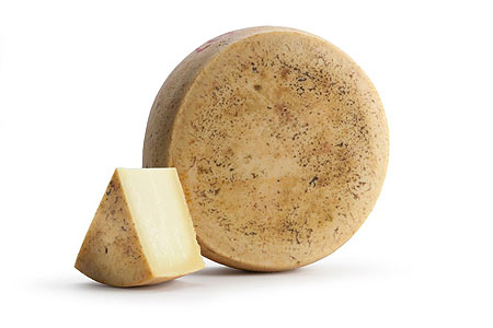 Formaggio Maiorchino